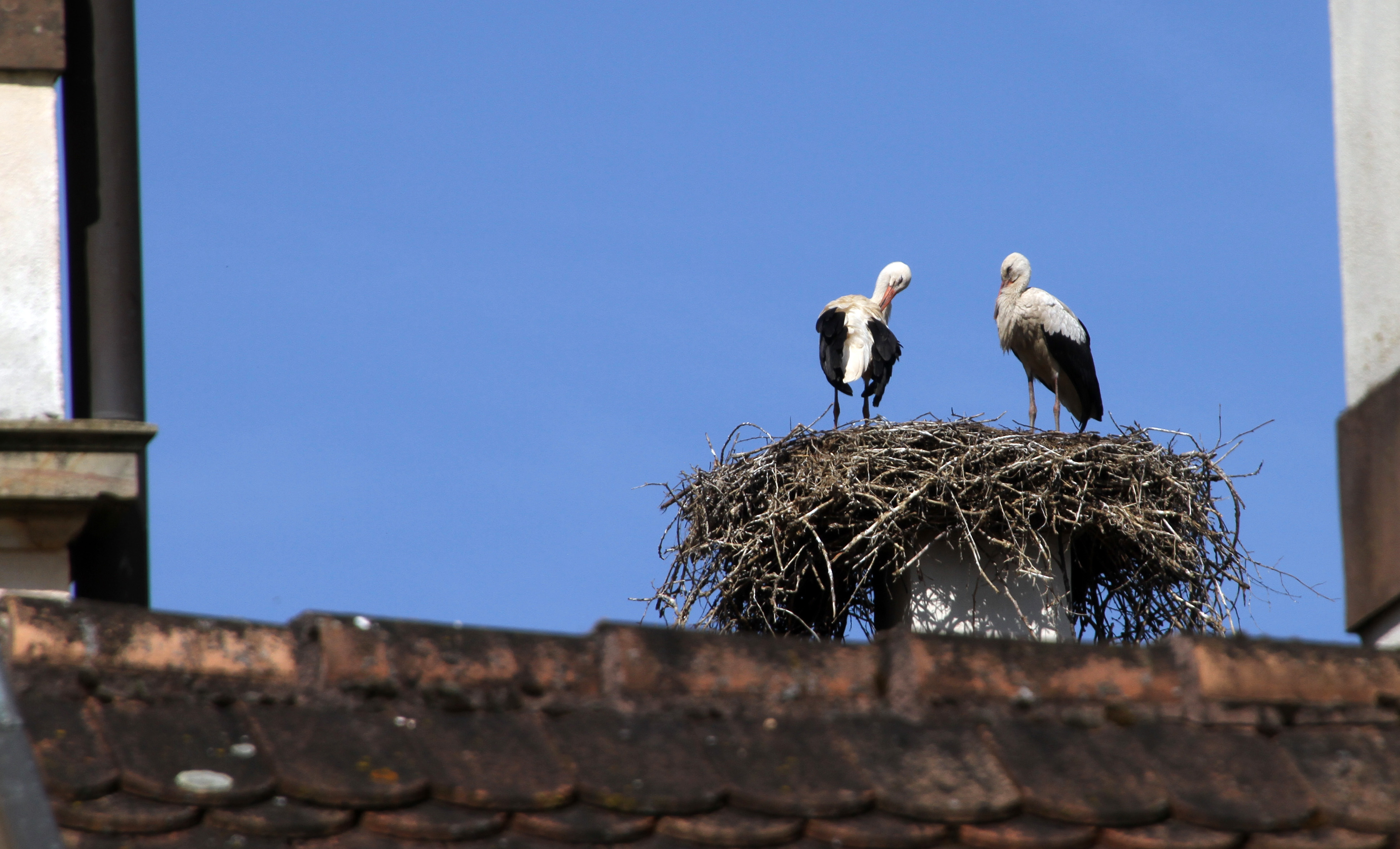 Kirschbacherhof (Dietrichingen)